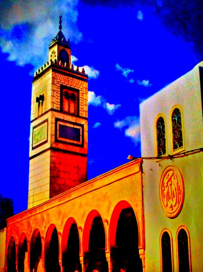 Béni Khalled, Tunisie بني خلاد, تونس